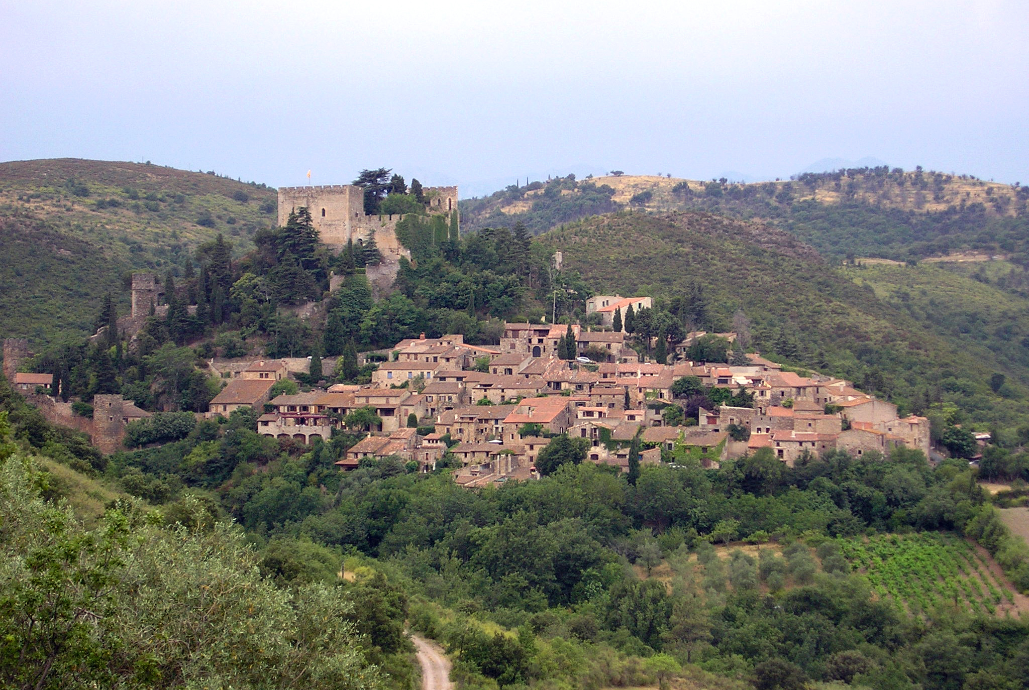 Castellnou dels Aspres Source: Makinal